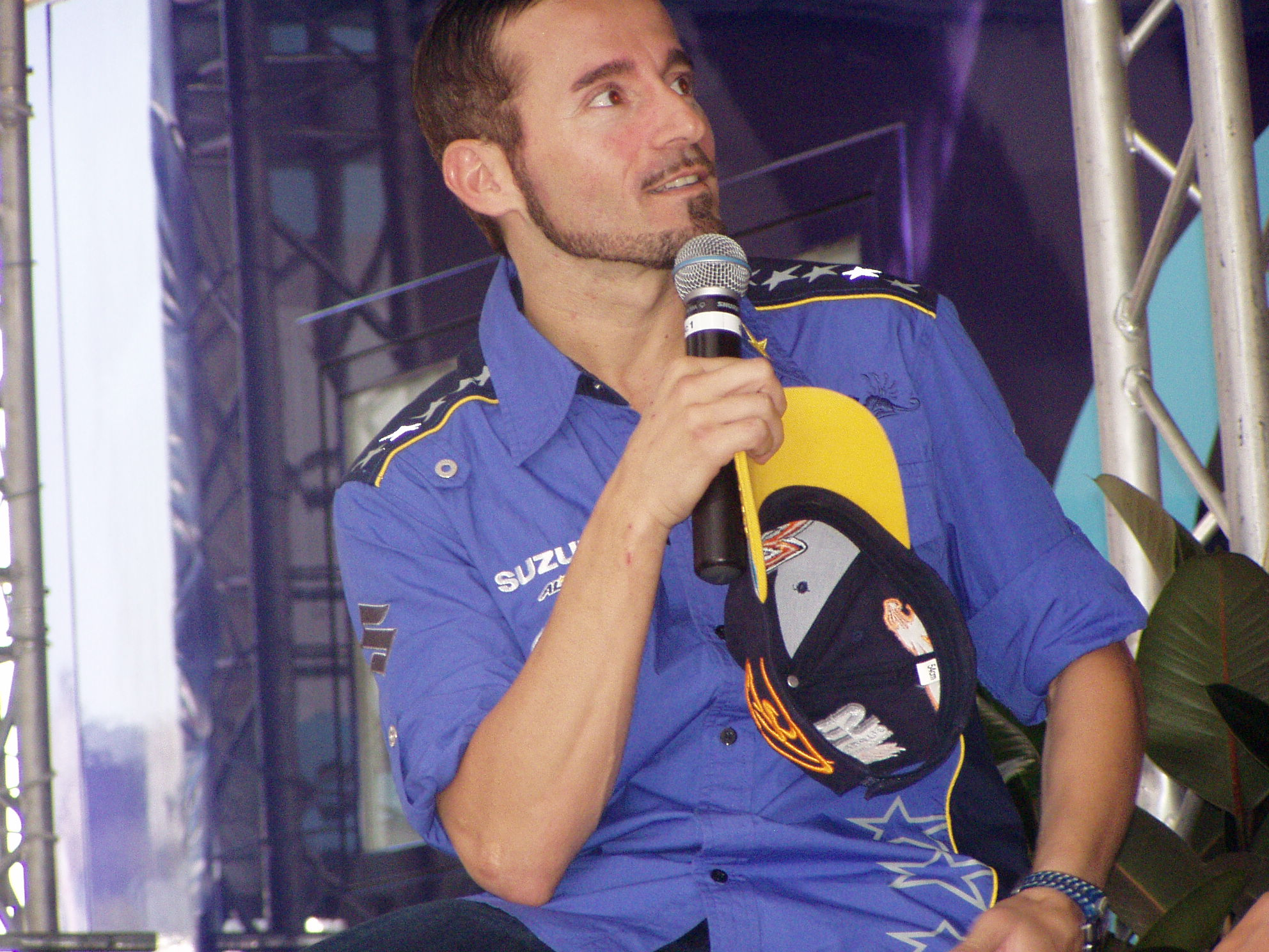 Immagine da me scattata di Max Biaggi